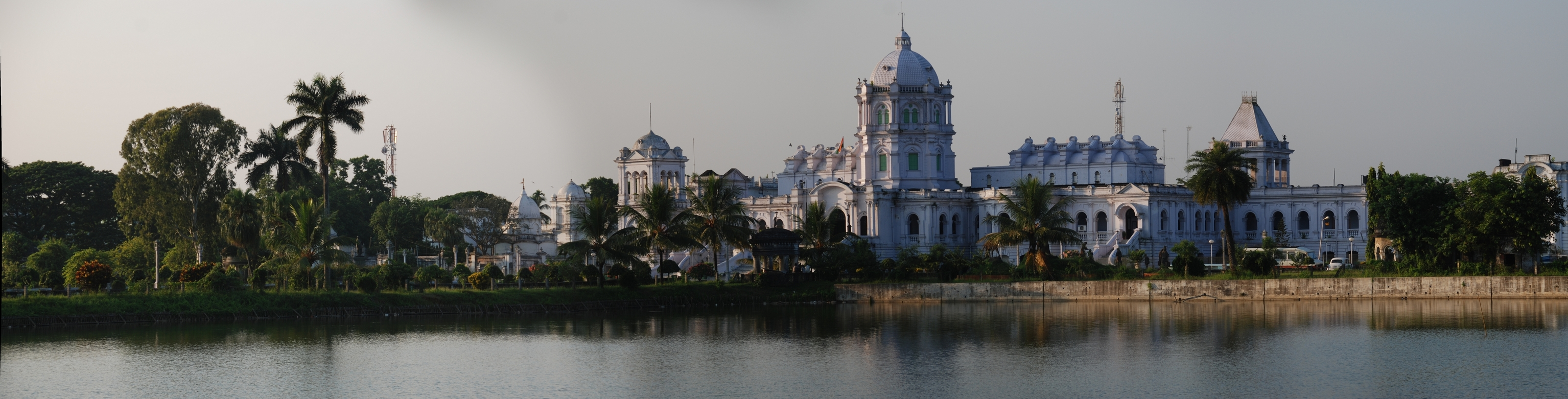 Ujjayanta Palace